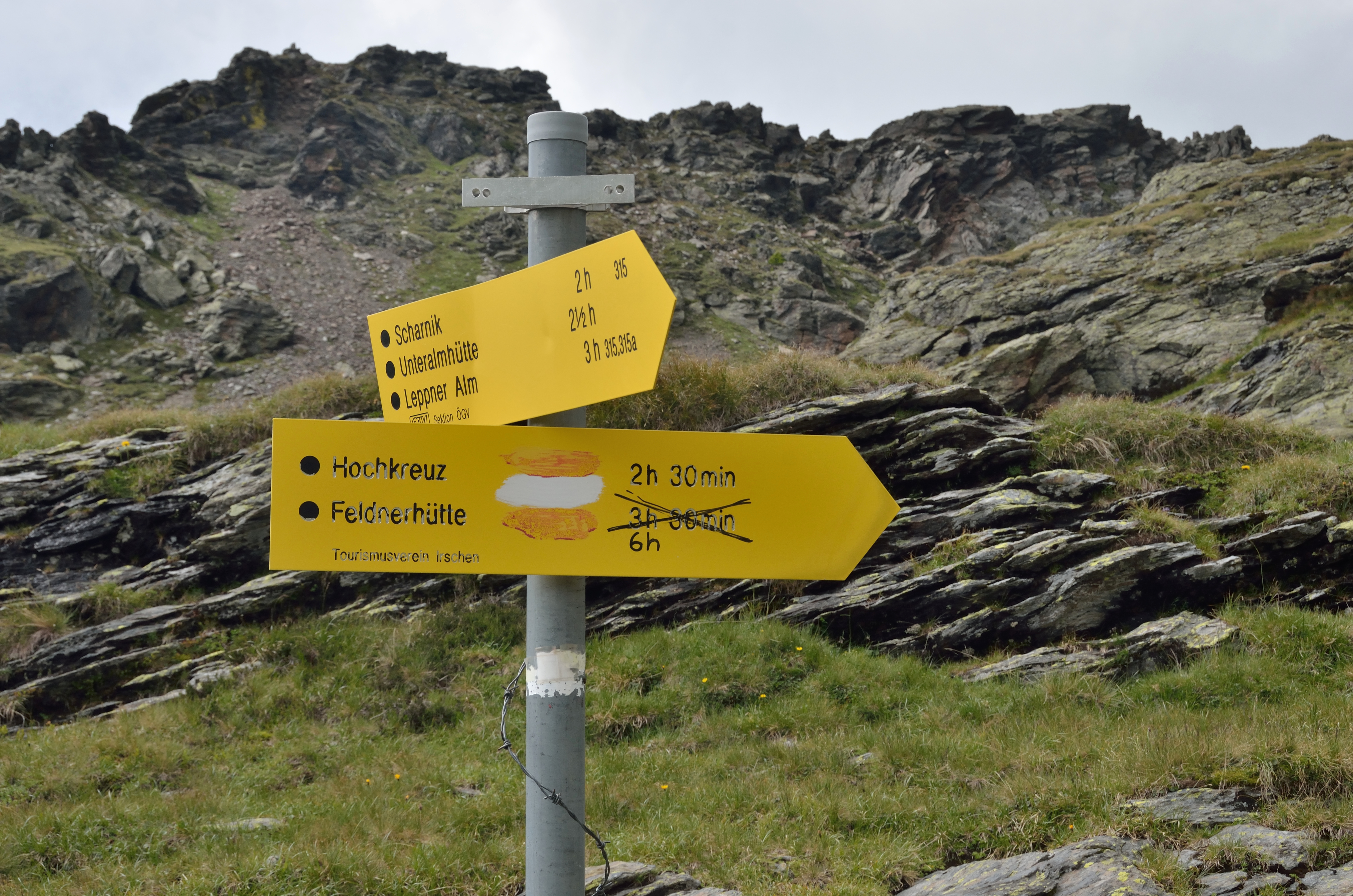 Wegweiser am Kreuzeck-Höhenweg (¼ Stunde vor der Hugo-Gerbers-Hütte) zurück zur Feldnerhütte. Die Zeiten am Kreuzeck-Höhenweg sind generell nicht üppig angegeben, hier sind sie manuell korrigiert.